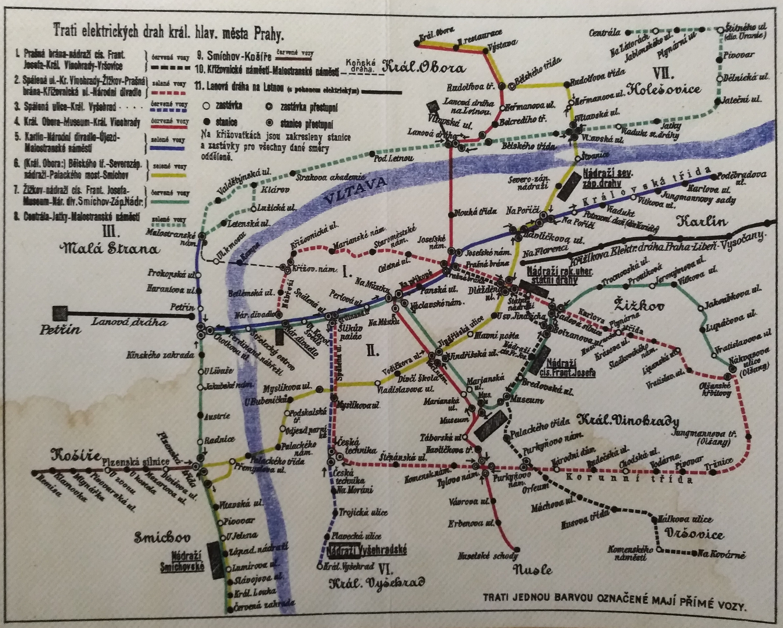 Mapa (schéma) Elektrických drah královského hlavního města Prahy, cca rok 1902